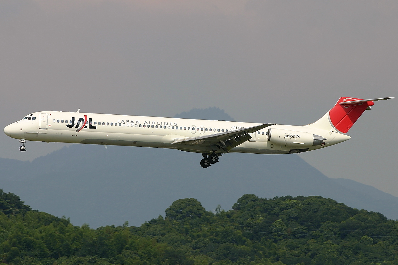 日本航空 マクドネル・ダグラス MD-81 福岡空港